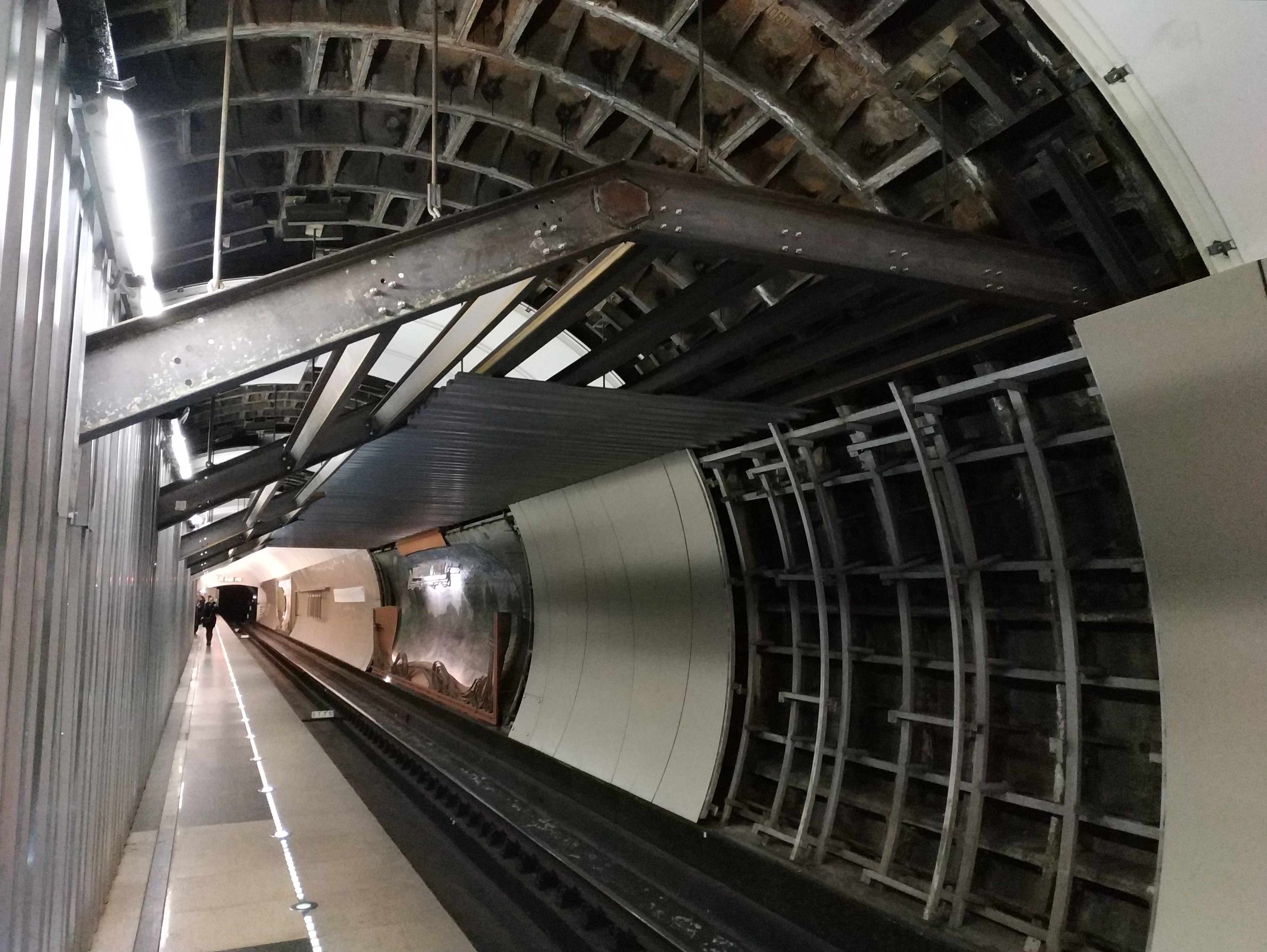 Московской Метро Станция Марьина Роща Строительство перехода на линию БКЛ